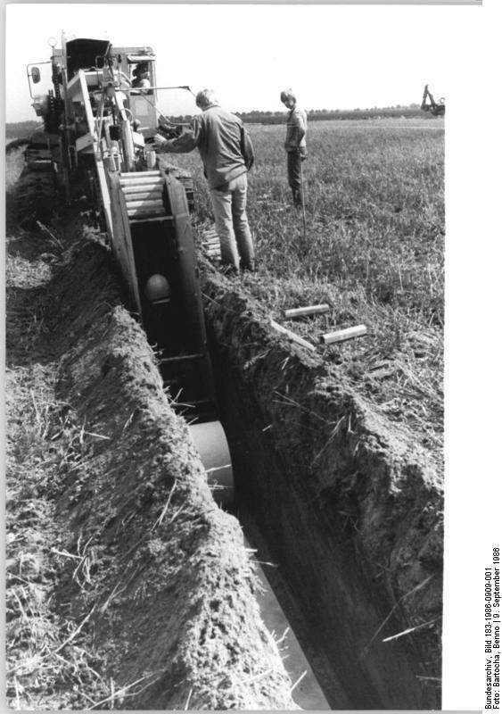 Ducherow, Meliorationsarbeiten ADN-ZB Bartocha 9.9.86 Bez. Neubrandenburg: Meliorationsarbeiten werden derzeit auf den Flächen der LPG Ducherow von der Meliorationsgenossenschaft Friedländer Große Wiese durchgeführt. Die Landwirtschaftsbetriebe zwischen Haff und Müritz verfügen über Bewässerungsanlagen für rund 210.000 Hektar Acker- und Grünland. Die Hälfte aller Grünlandflächen können bei Bedarf - vorwiegend durch einfache Anlagen wie Ein- und Anstau - zusätzlich mit Wasser versorgt werden.